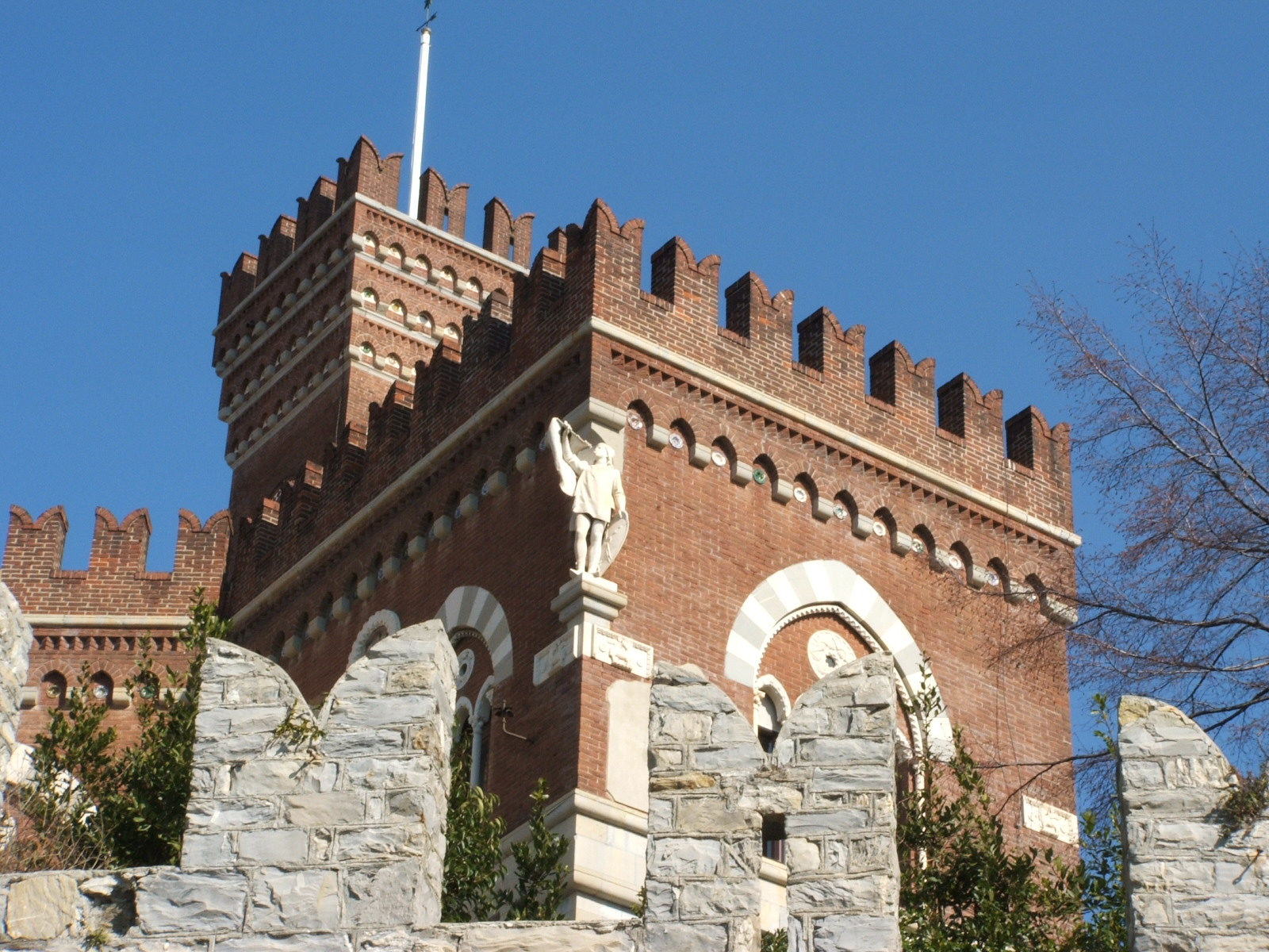 Genova, Castello d'Albertis